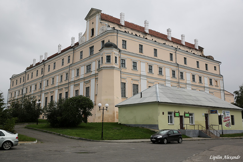 Пінск. Кляштар францысканцаў